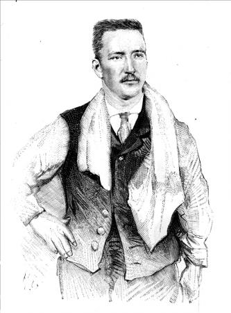 Imagem De Lherot, o camareiro que dedurou o anarco-terrorista Ravachol.